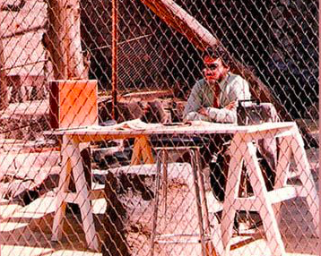 Hernán Miranda protagonizó una acción de arte de protesta recluyéndose en el Parque Metropolitano vestido de oficinista, junto a un escritorio y una máquina de escribir.